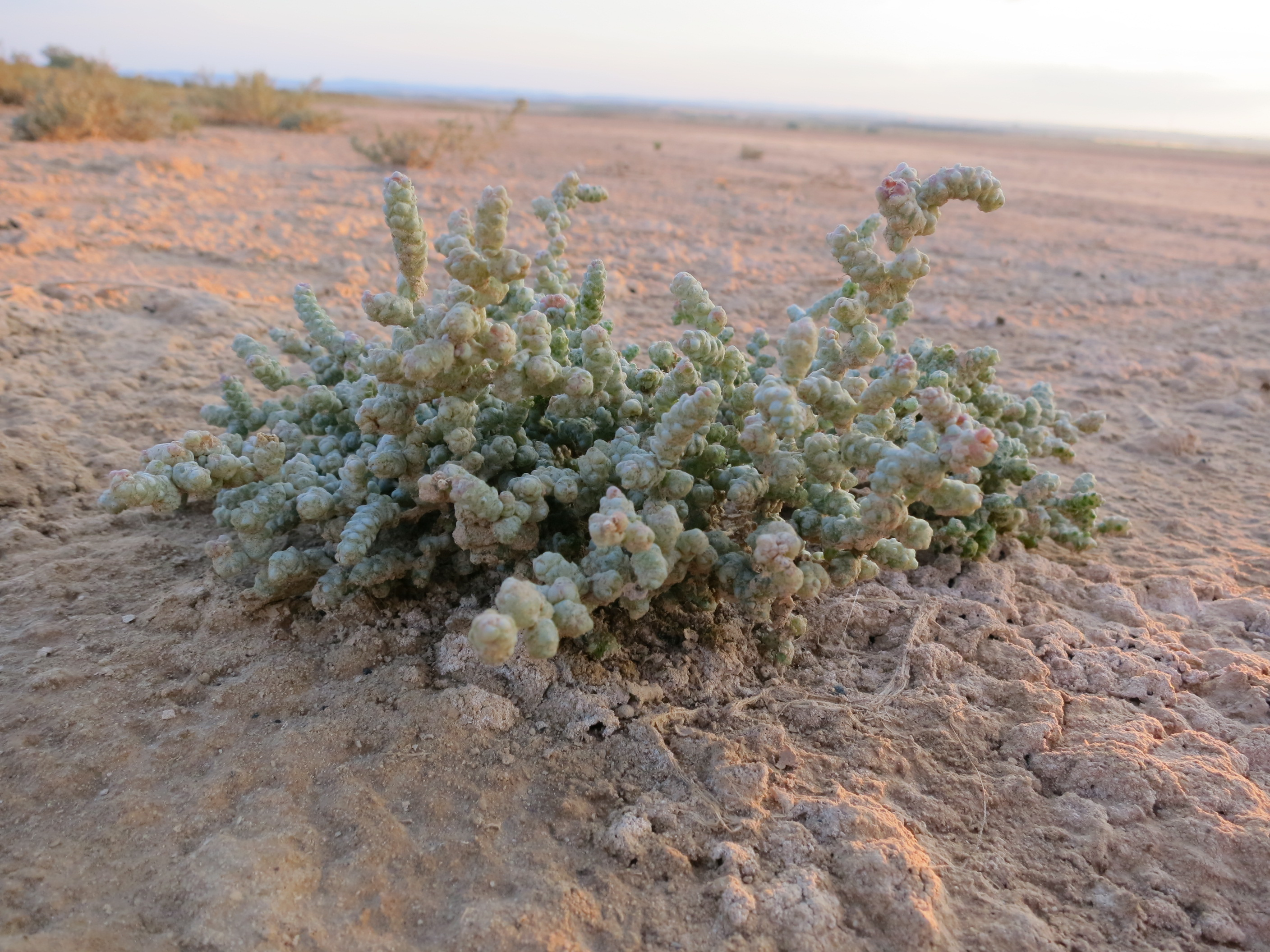 Salicornia enana. La Salada Grande, laguna endorreica en Alcañiz. Teruel. Aragón. España.